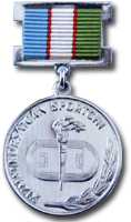 Знак к почётному званию «Заслуженный спортсмен Республики Узбекистан»